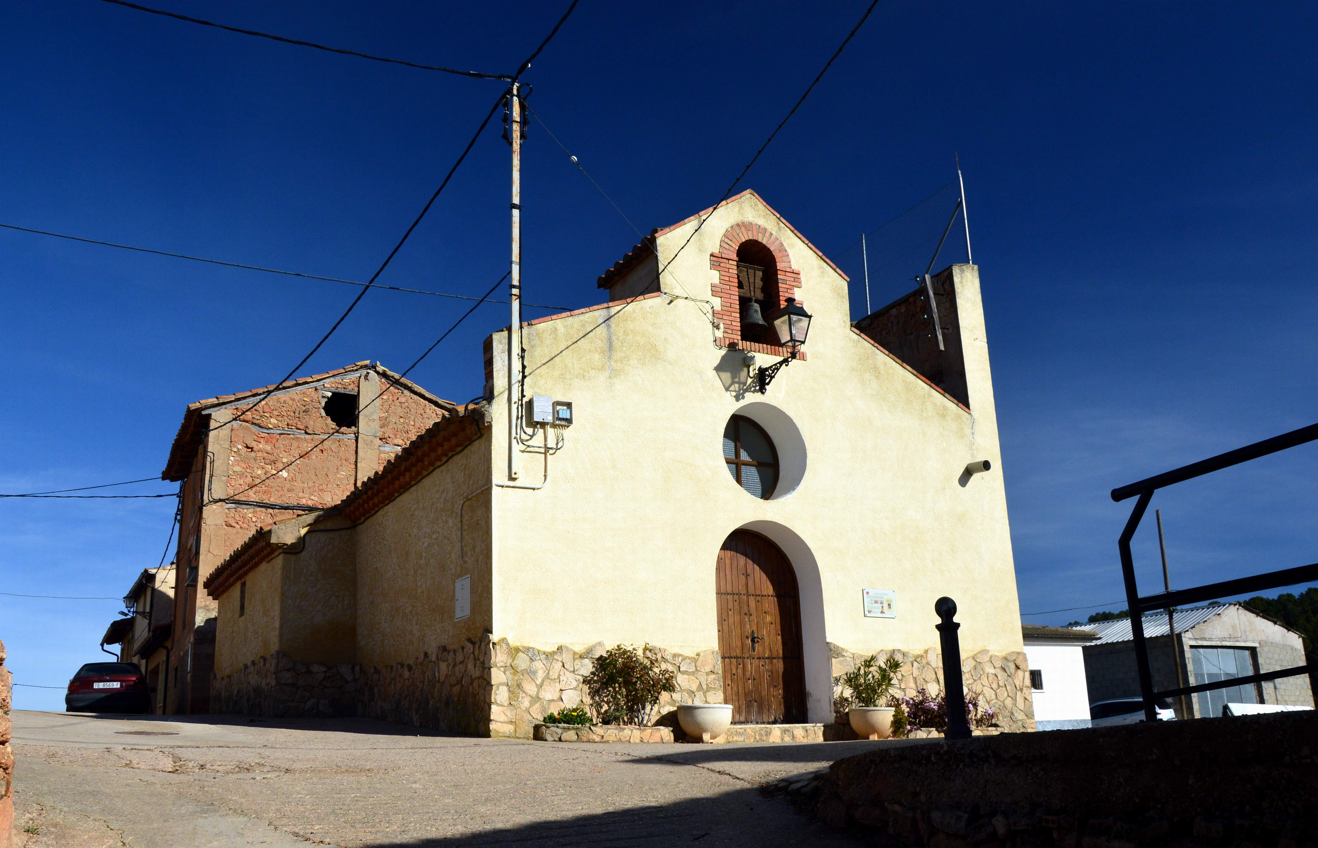 Vista fronto-lateral izquierda (suroccidental) de la Ermita de San Sebastián en Mas de Jacinto (Castielfabib, Valencia), 2018.